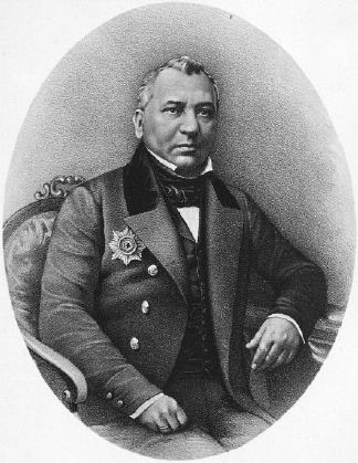 П.М. Донауров (1801 - 1863) - русский государственный деятель